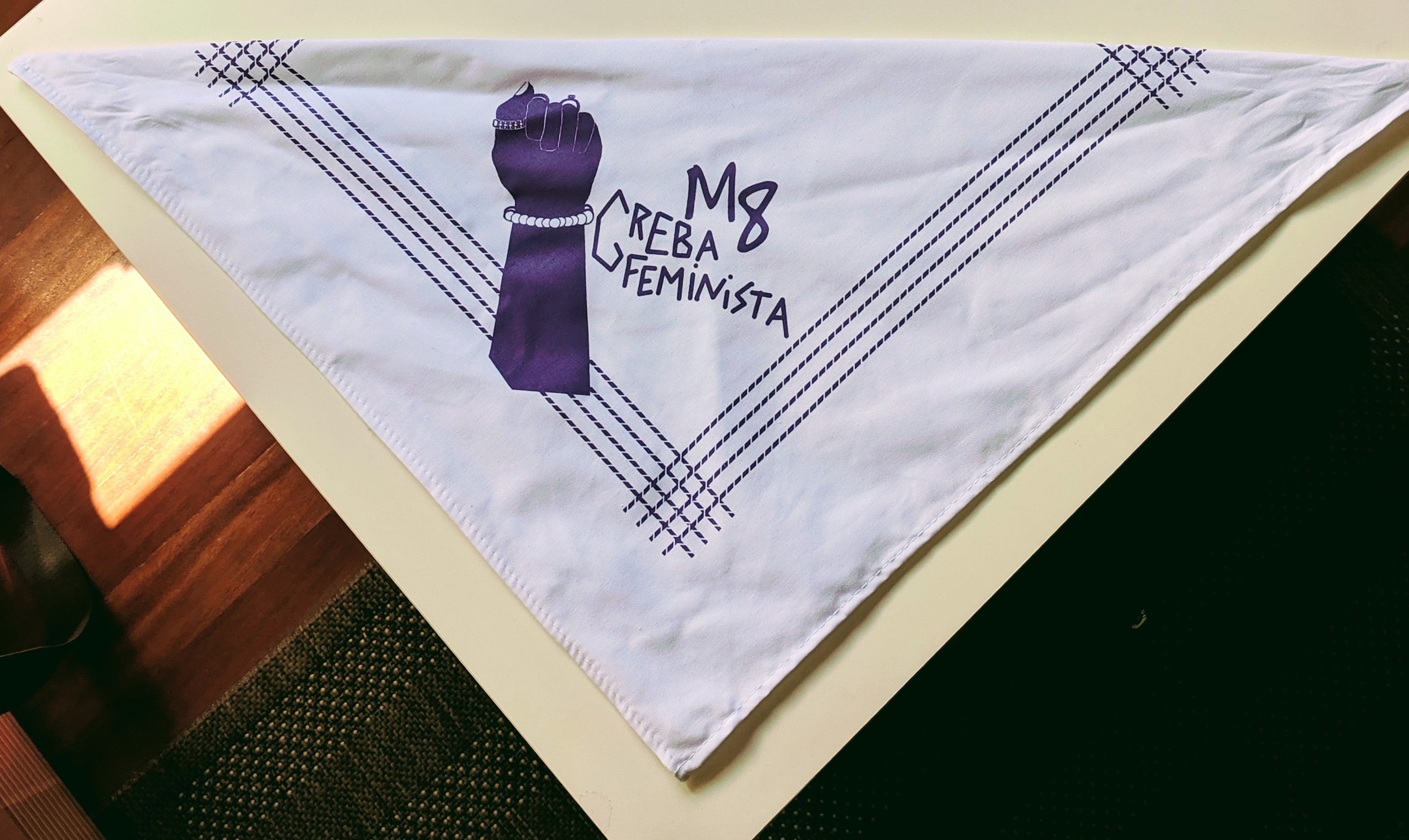 2019ko Martxoak 8 egunerako Euskal Herrian milaka emakumek* kaleak hartu eta sistema heteropatriarkatu kapitalistari planto egin zioten. Hau da deaildirako erabilitako logoa daraman zapia.